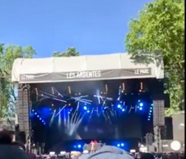 Le Parc durant le Festval Les Ardentes en 2018